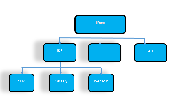 Монгол: butets